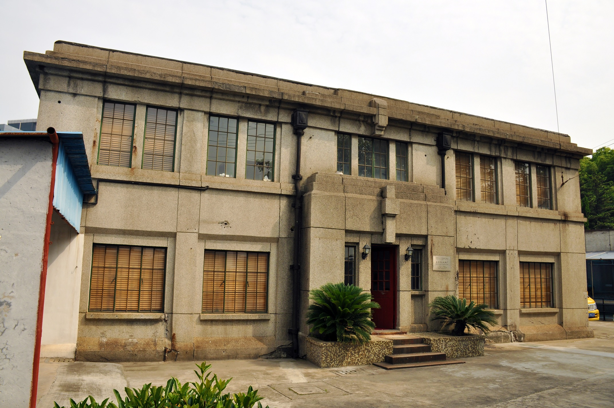 东区污水处理厂办公楼 河间路1283号